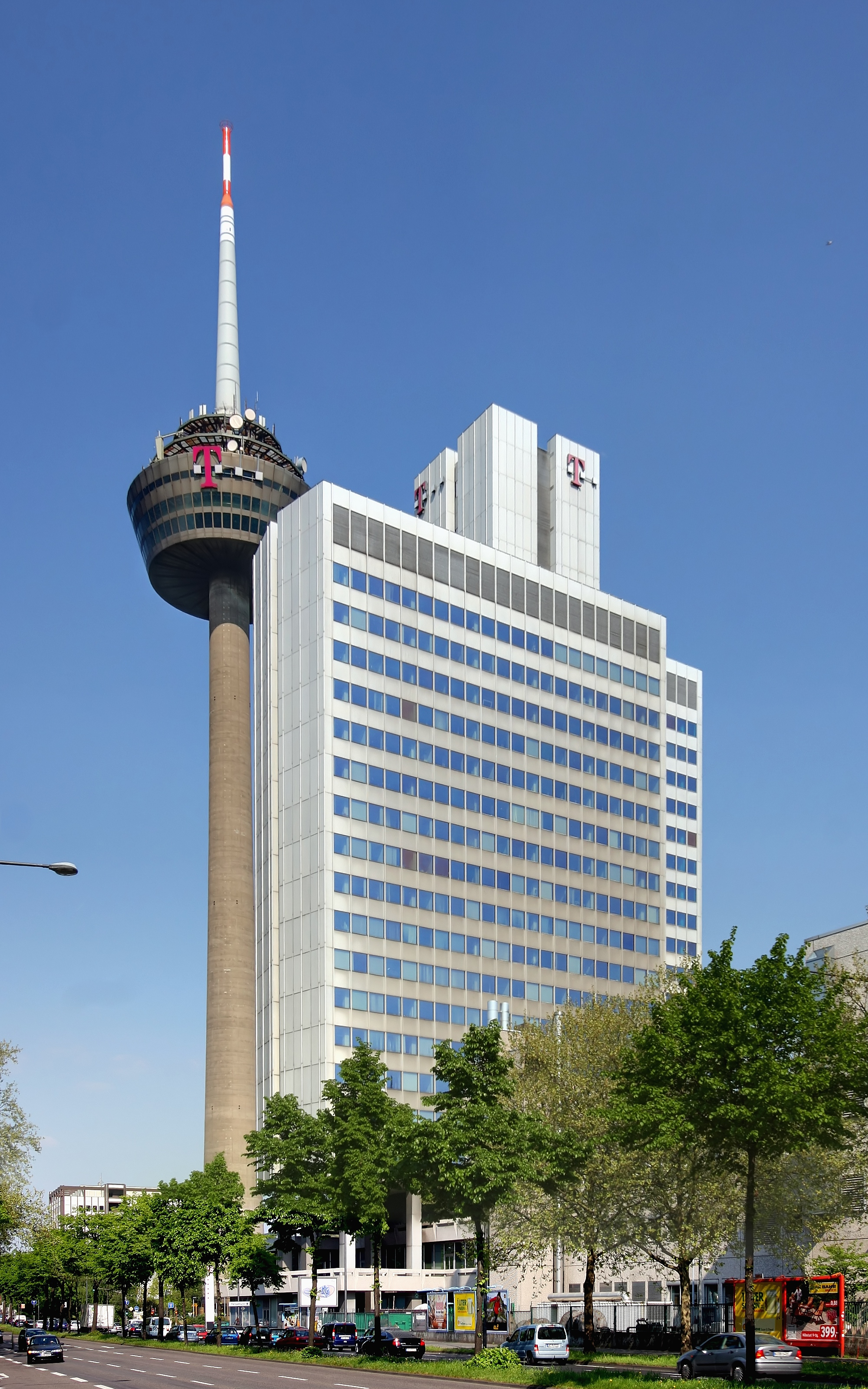 Telekom-Hochhaus Innere Kanalstraße in Köln, im Hintergrund der Fernsehturm Colonius